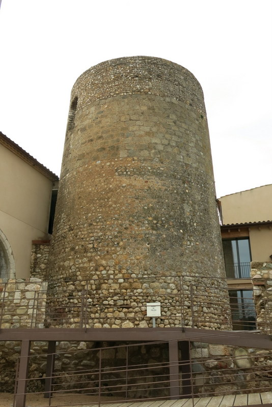 castell de Vila-Sacra_Alt Empordà - Catalunya